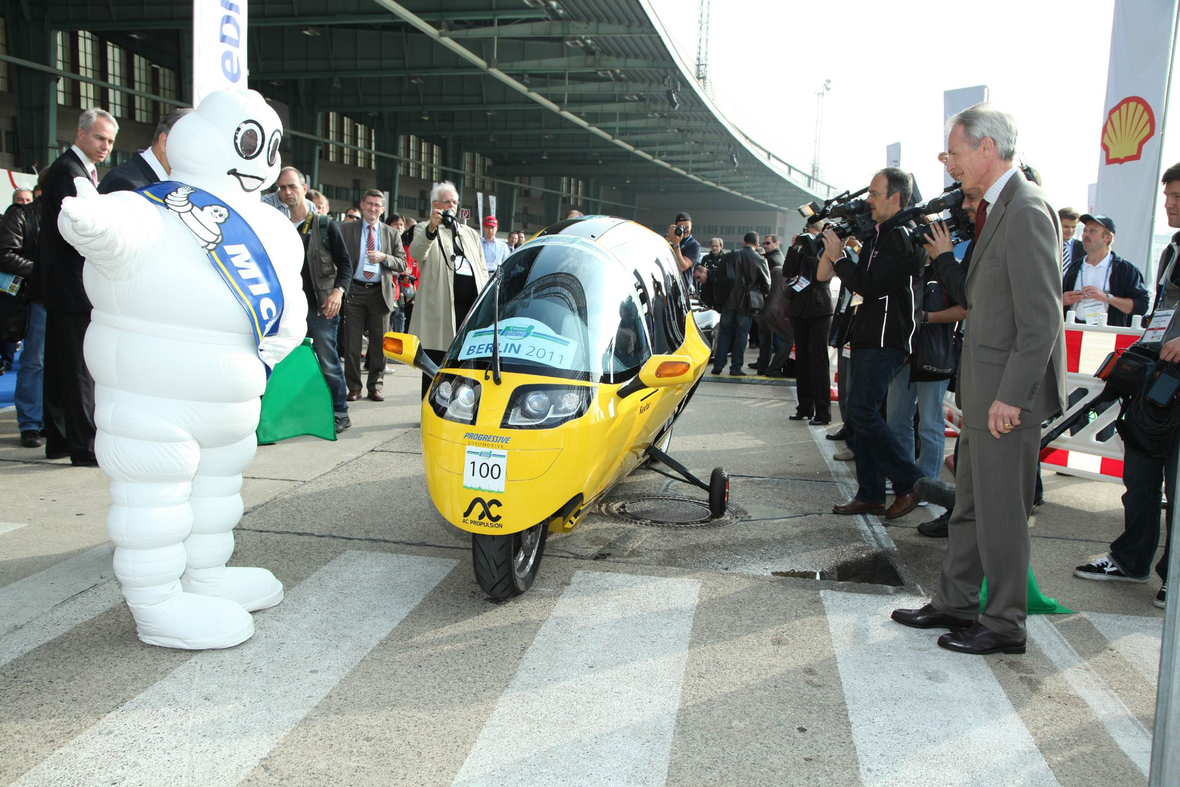 Offizieller Start zur Intercity-Rallye